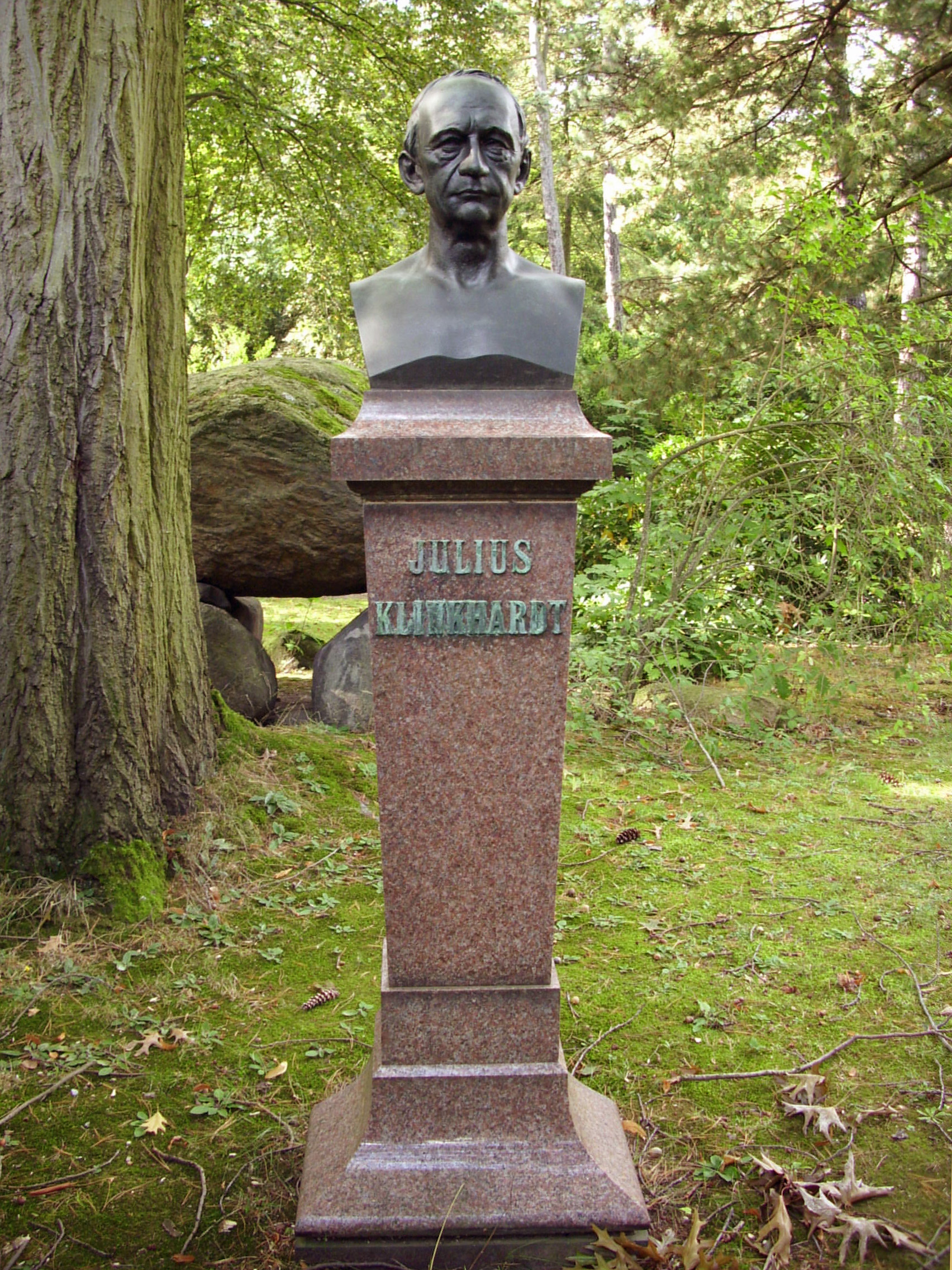 Werner Stein: Grabmal Julius Klinkhardt